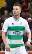 Dare Vršič - Bohemians V Olimpija Ljubljana (28 of 37)